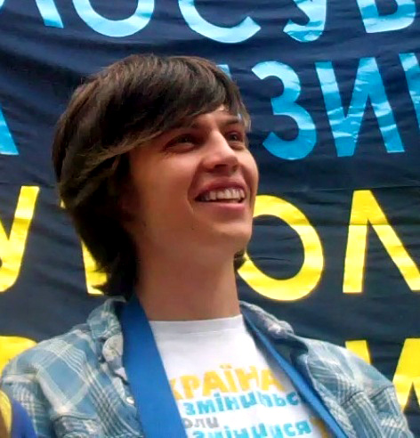 Ярослав Джусь на акції протесту проти законопроекту «Про засади державної мовної політики»